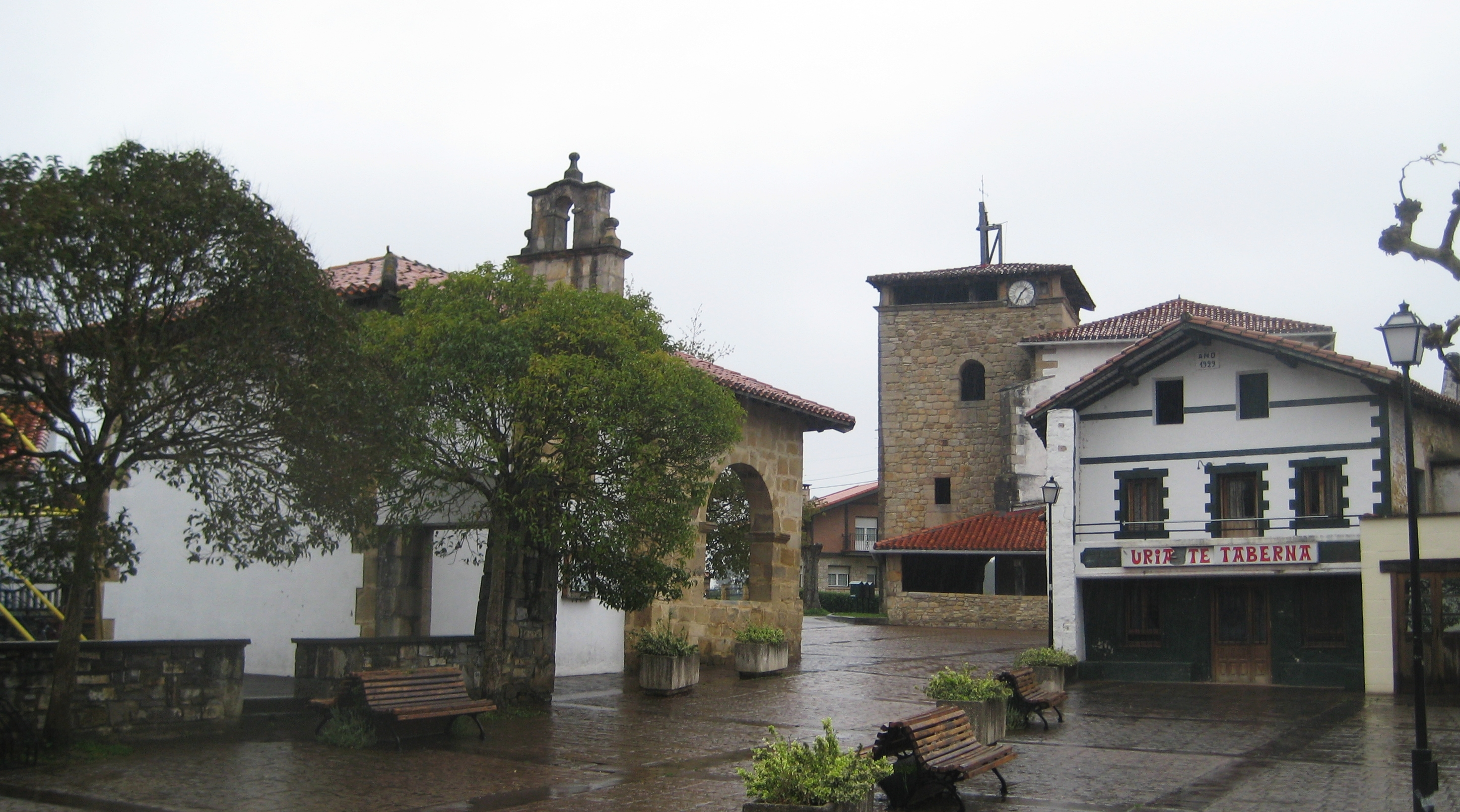 Plaza, iglesia y ermita en Fika